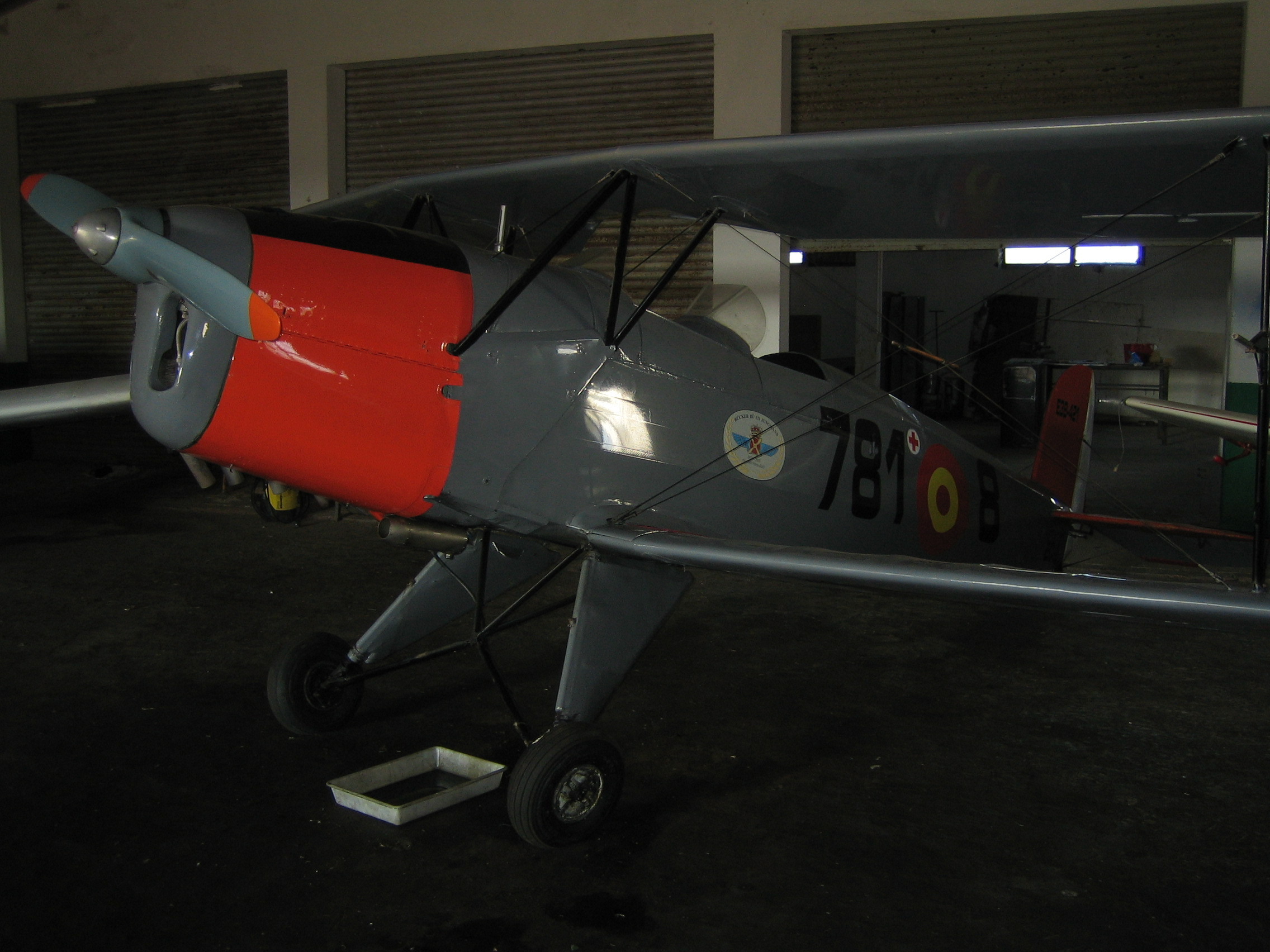 C.A.S.A 1131 (Bücker Bü 131 Jungmann construido bajo licencia en España) en el Aeròdromo de Sant Lluís